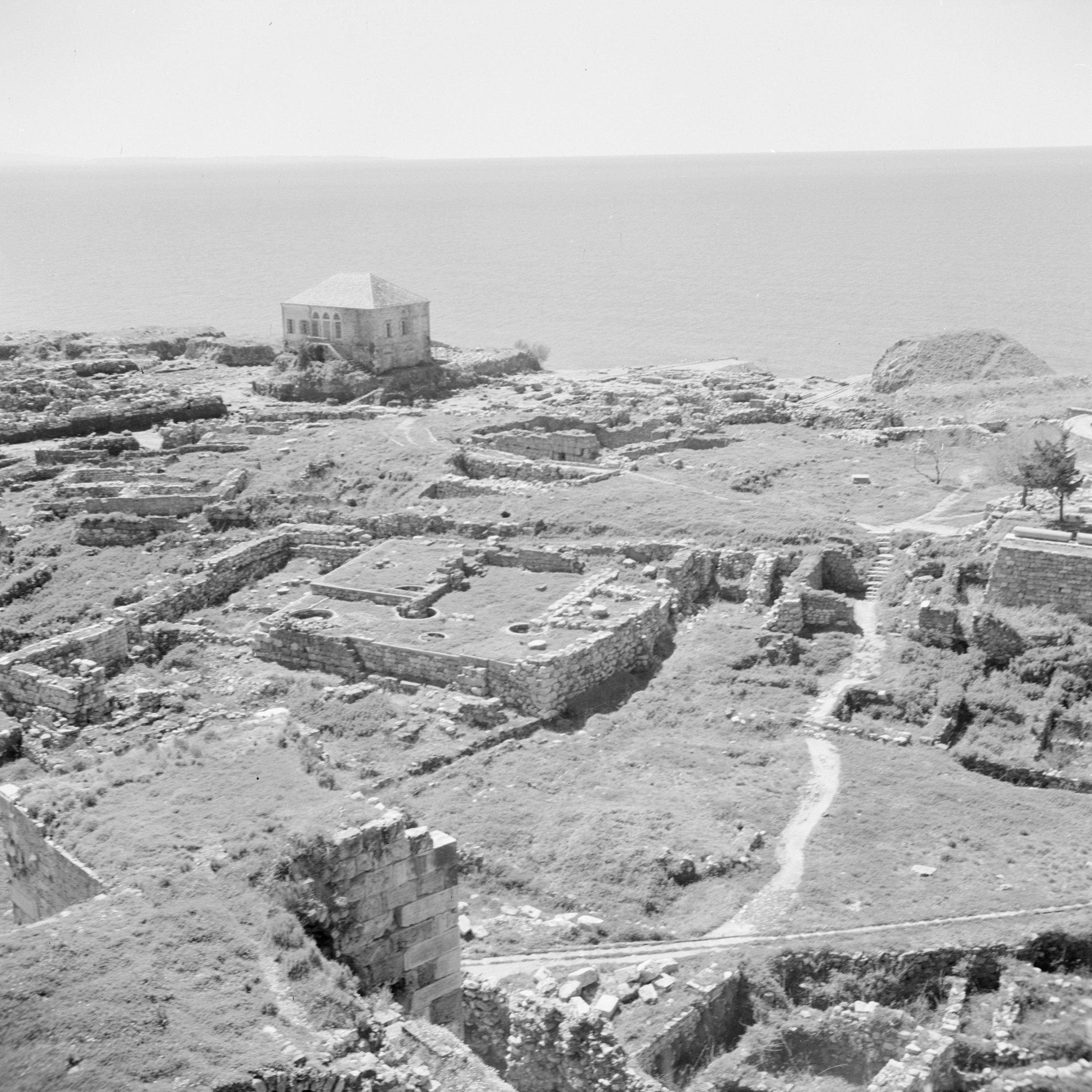 Collectie / Archief : Fotocollectie Van de Poll Reportage / Serie : Midden-Oosten 1950-1955: Libanon Beschrijving : Uitzicht op Byblos met op de voorgrond ruïnes, op de achtergrond de Middellandse Zee Datum : 1950 Locatie : Byblos, Libanon Trefwoorden : muren, ruïnes, zeeën Fotograaf : Poll, Willem van de Auteursrechthebbende : Nationaal Archief Materiaalsoort : Negatief (zwart/wit) Nummer archiefinventaris : bekijk toegang 2.24.14.02 Bestanddeelnummer : 255-6370